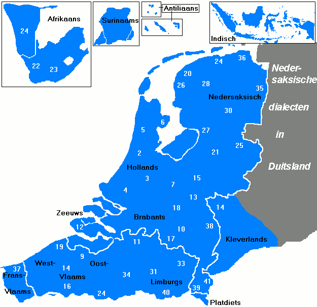 De afstand van de Nederlandse streektalen en het Afrikaans tot de Nederlandse standaardtaal.